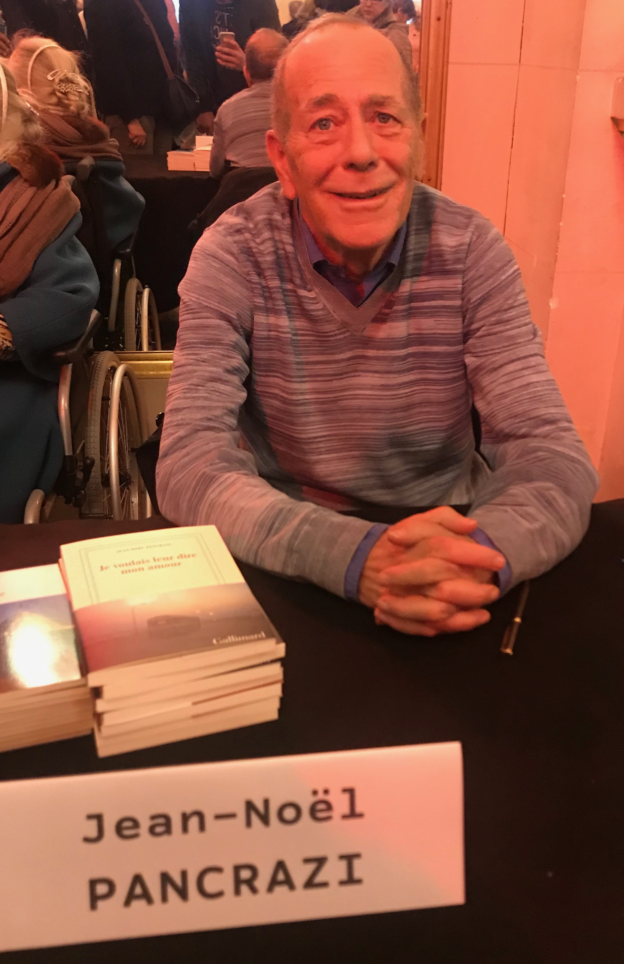 Jean-Noël Pancrazi, Maghreb-Orient des Livres, Paris, février 2018.